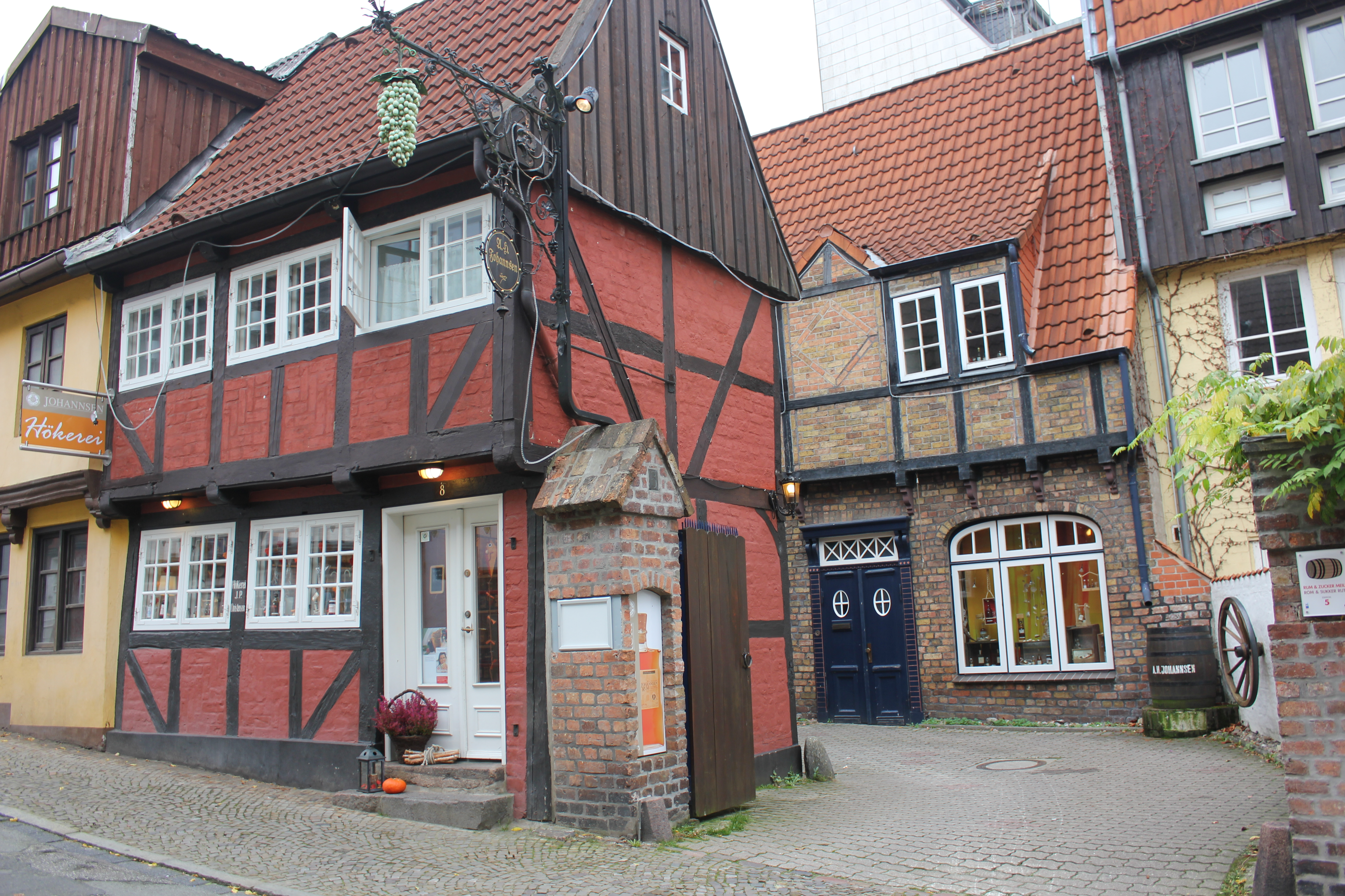 Johannsen Rum; Vor der Tür liegt ein kleiner Halloween-Kürbis da Gebäude nach Jahreszeit geschmückt wird